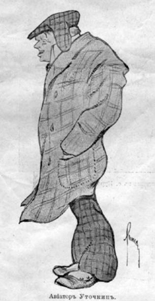 Карикатура М. С. Линского